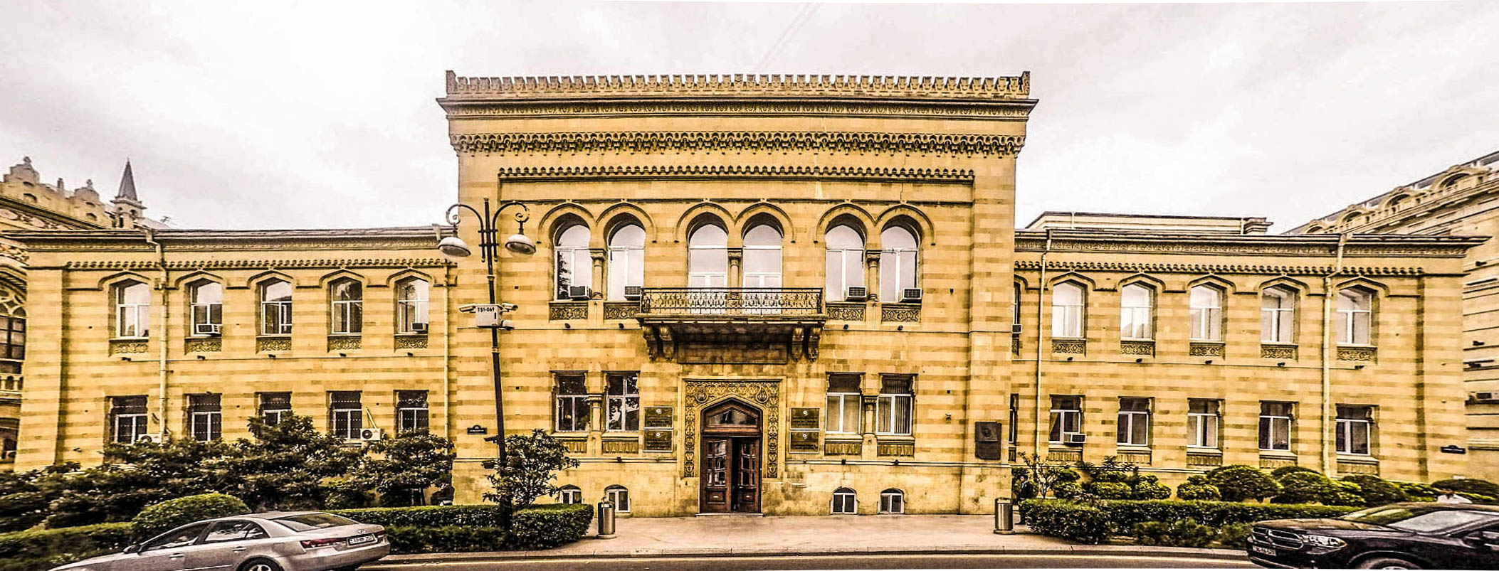 Əlyazmalar institutu